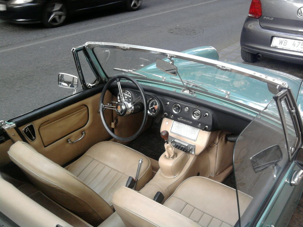 Mariahilferstraße, 1070 Wien